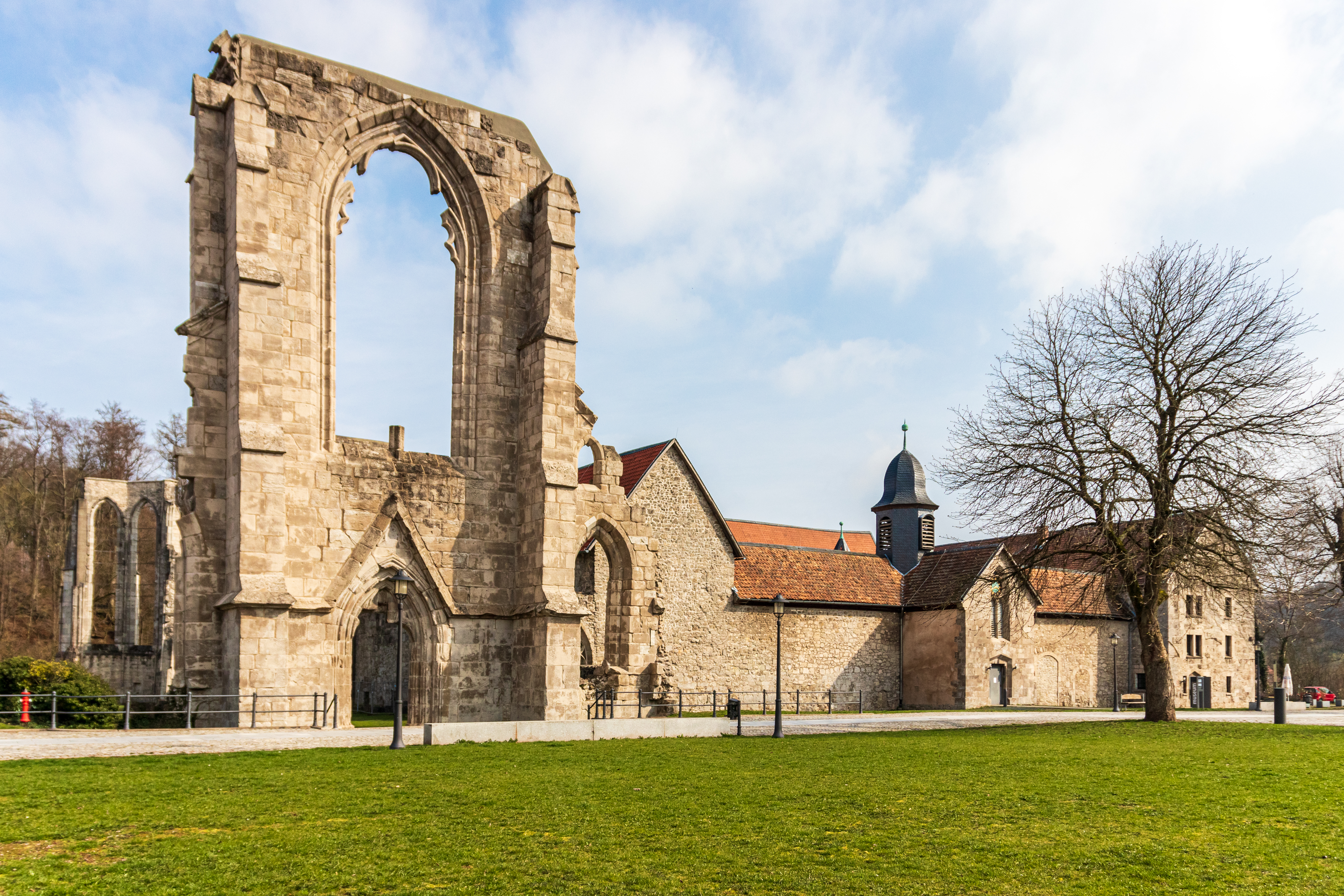 Kloster Walkenried – Blick von Westen auf die Klosteranlage mit der Ruine der Klosterkirche (links) und dem Klausurgebäude (rechts)